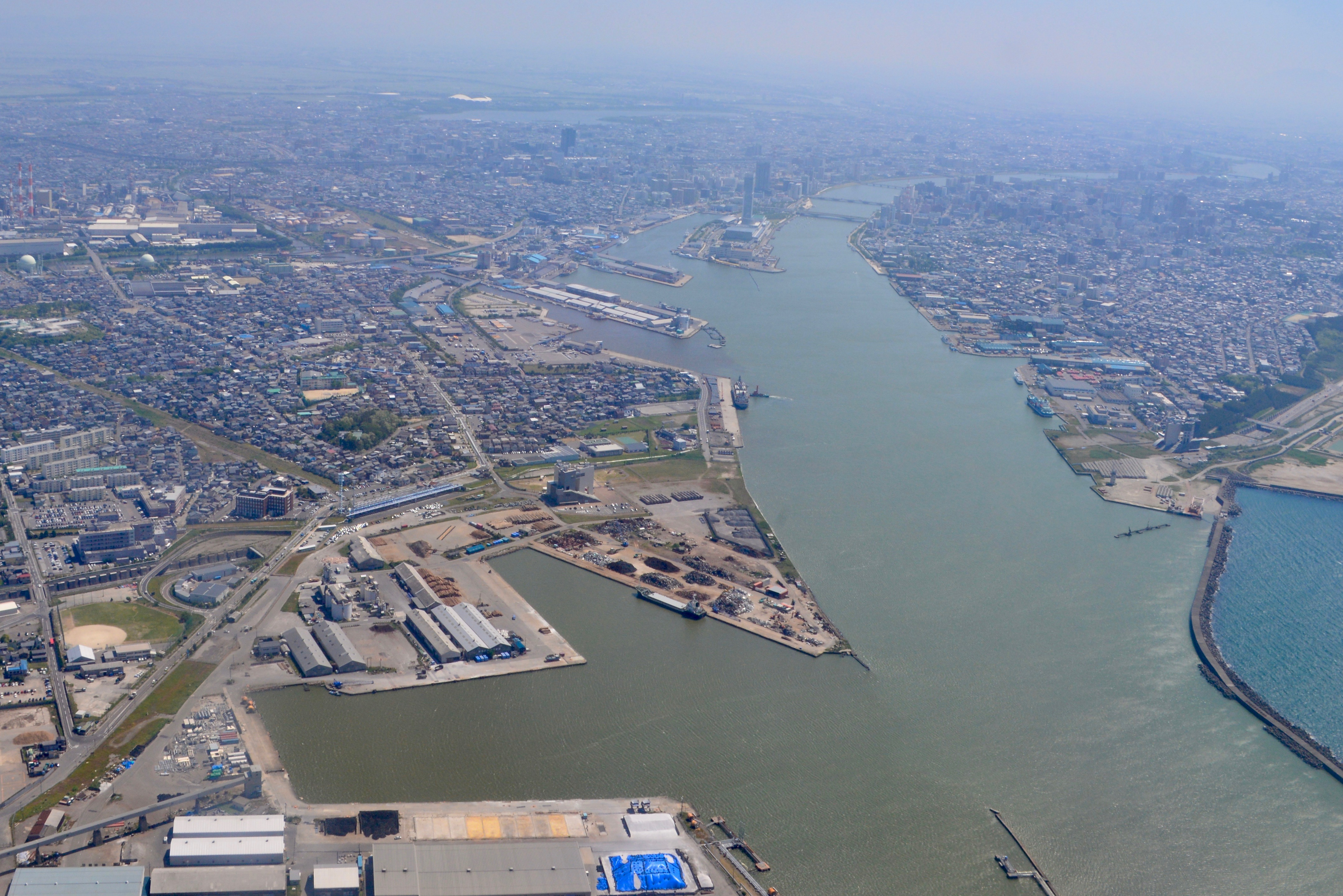 新潟西港。新潟空港から離陸する機内より撮影